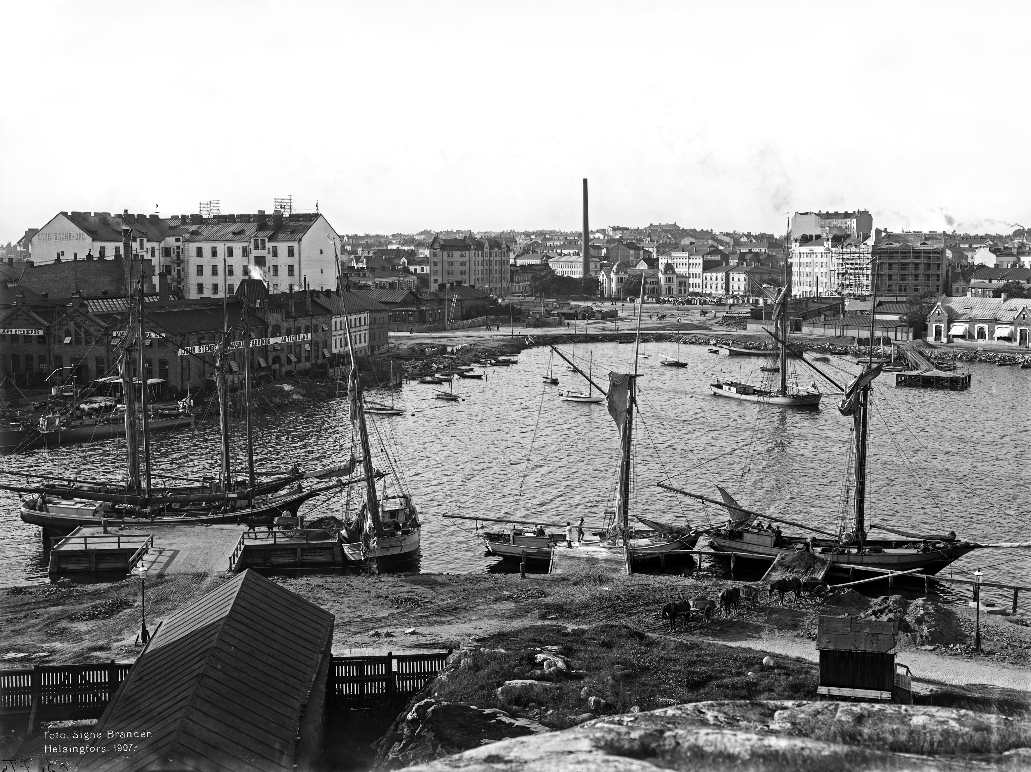 Siltavuorensatama. Vasemmalla Siltasaarenkatu 1, John Stenbergin konetehdas. Nykyinen John Stenbergin ranta 4. Keskellä Hakaniementori. Kuvattu Siltavuorelta pohjoiseen. -- negatiivi ja vedos, lasi paperi pahvi, mv